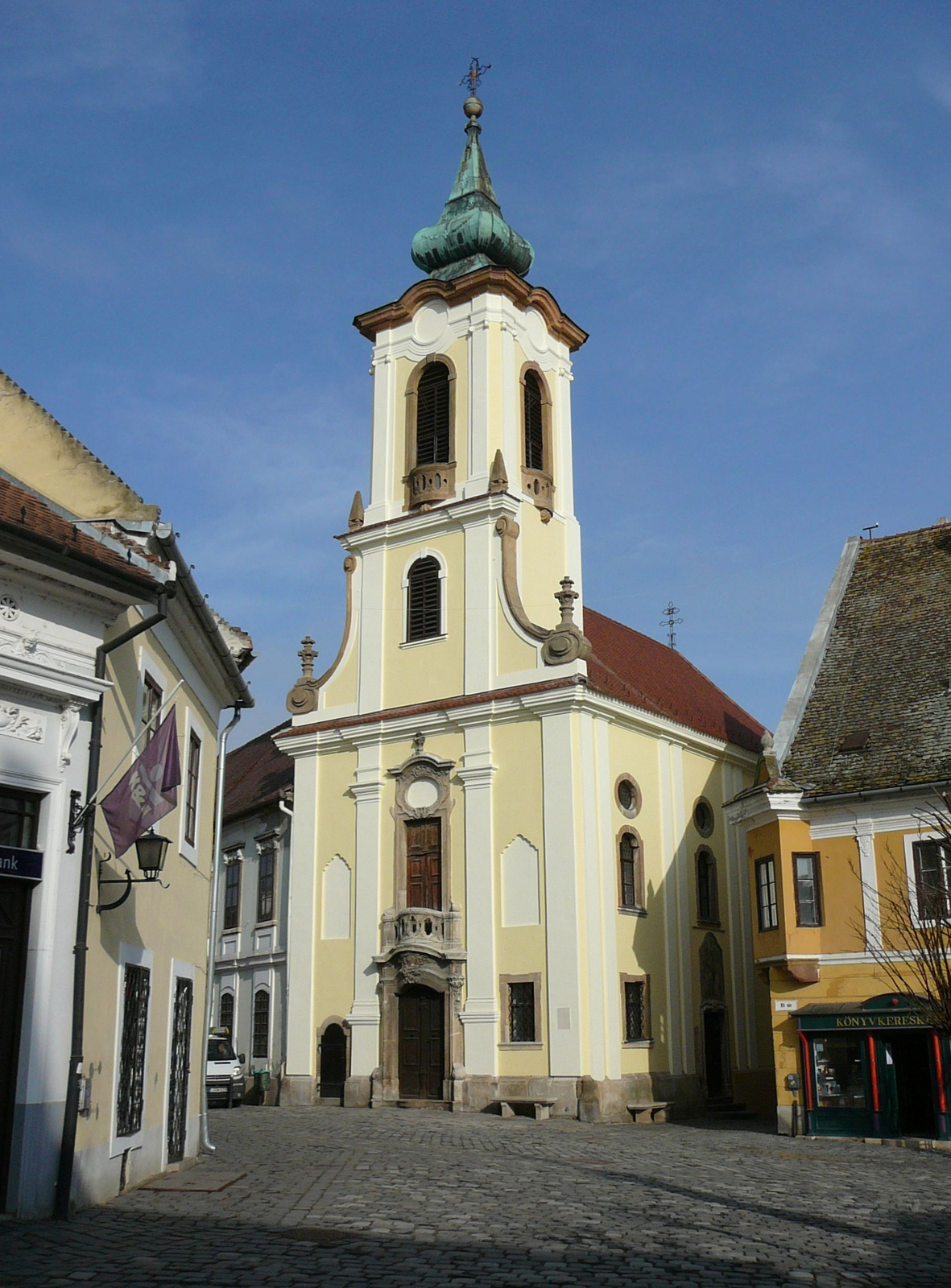 Blagovesztenszka-templom (Szentendre, Fő tér) This is a photo of a monument in Hungary. Identifier: 7351